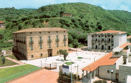 Palazzo Alario di Ascea (SA), costruito verso la fine del XVIII secolo e attuale sede della Fondazione Alario per Elea-Velia e del Museo del Paradosso